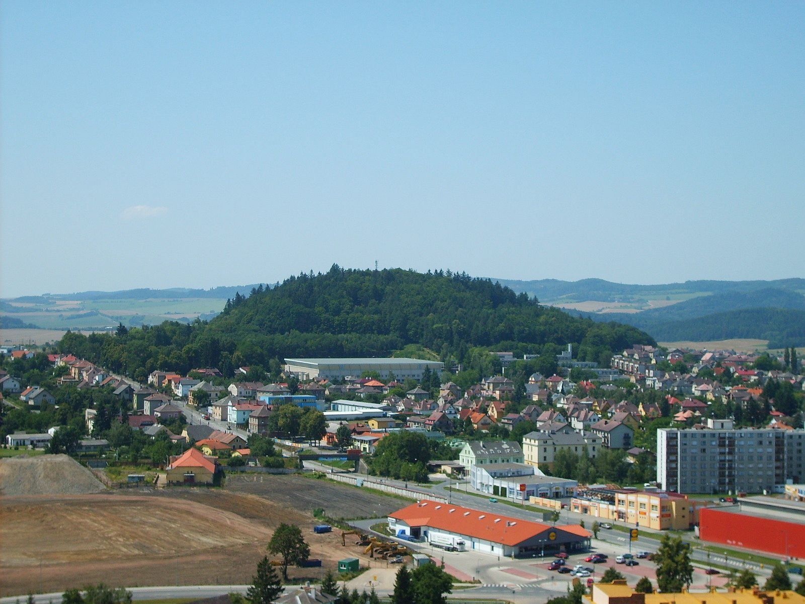 Klatovská hůrka (498 m) - view from Klatovy town hall tower